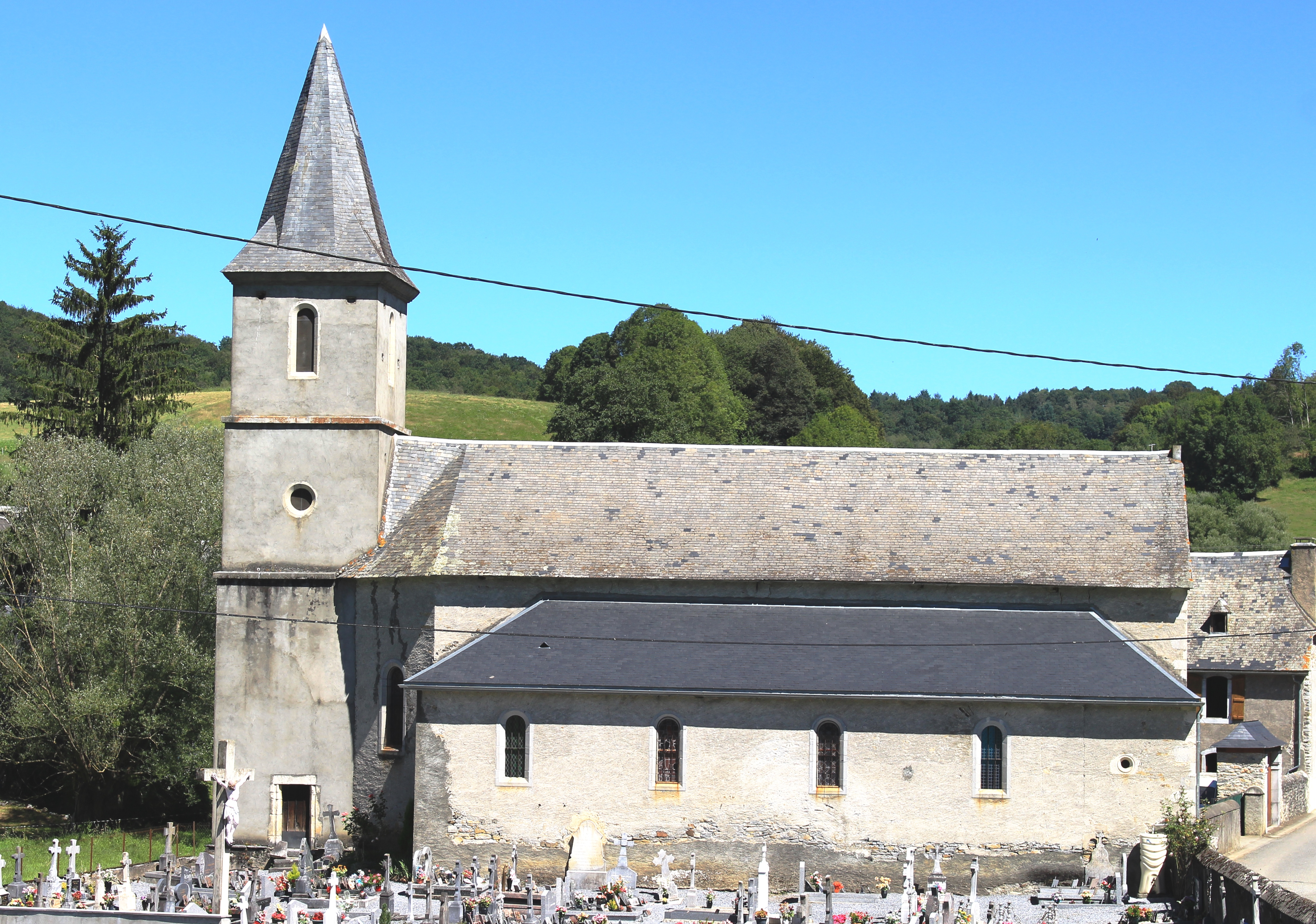 Église Saint-Vincent de Labastide (Hautes-Pyrénées)